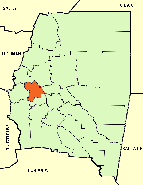 Mapa editado de: Santiago del Estero province (Argentina), departments and capital.png